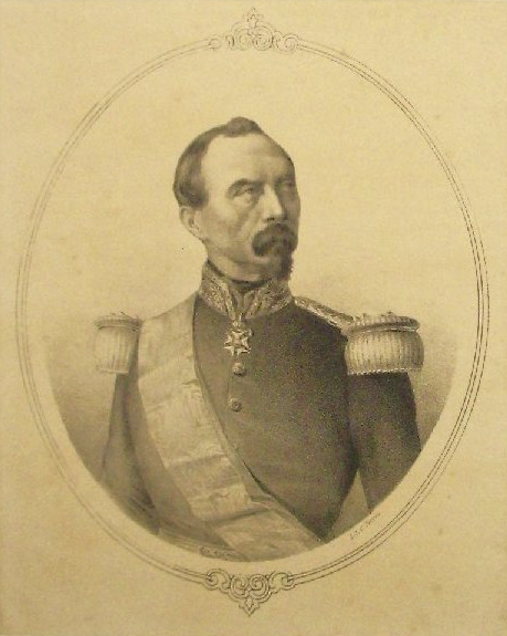 Portrait-Lithograpie des französischen Generals Esprit Charles Marie Espinasse (1815-1859)